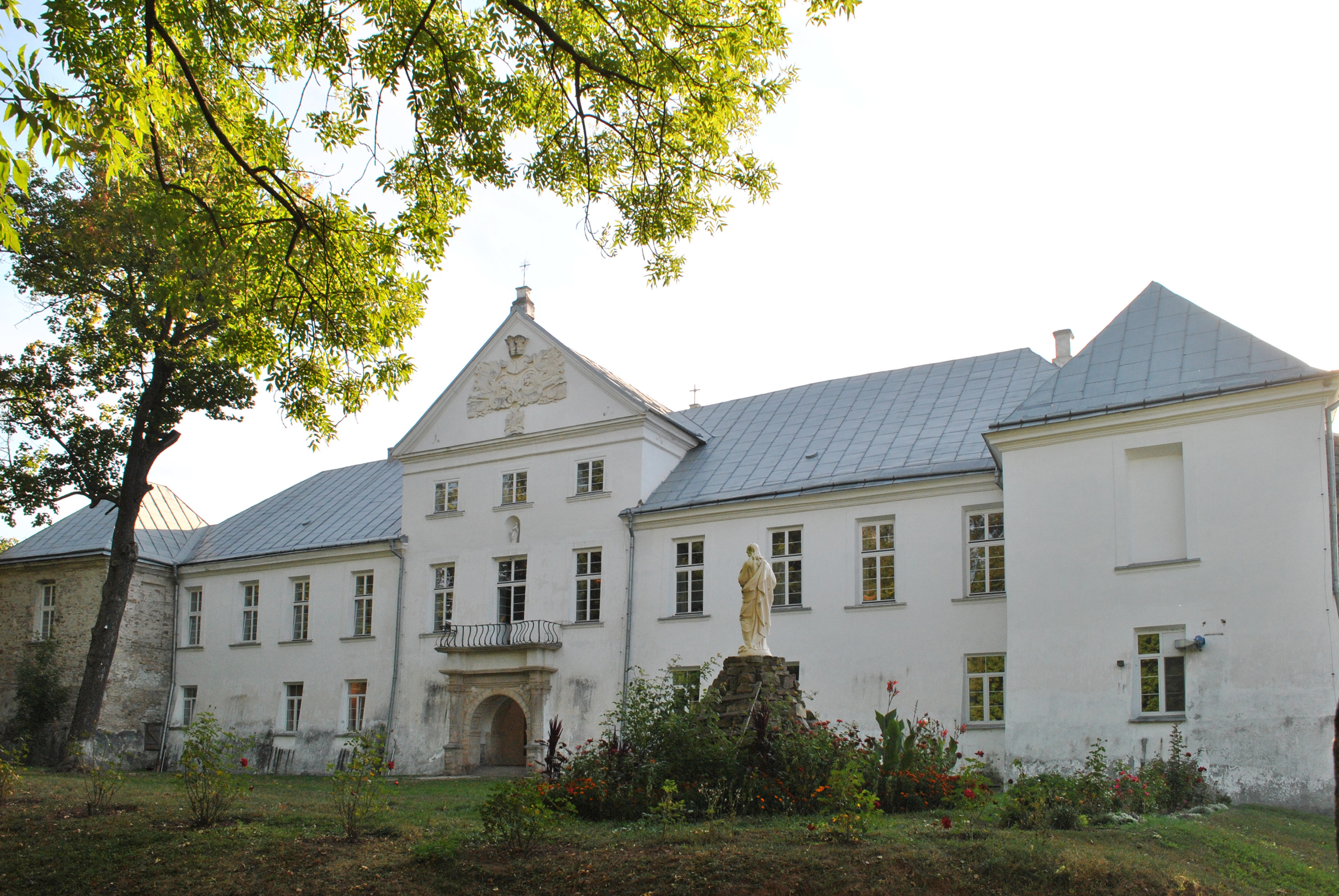 Палац XVII-XVIII ст. (мур.) у селі Язловець Бучацького району Тернопільської області. Вид на палац із боку парку.